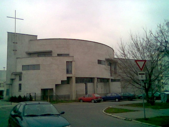 Nový kostol Šaľa - Veča